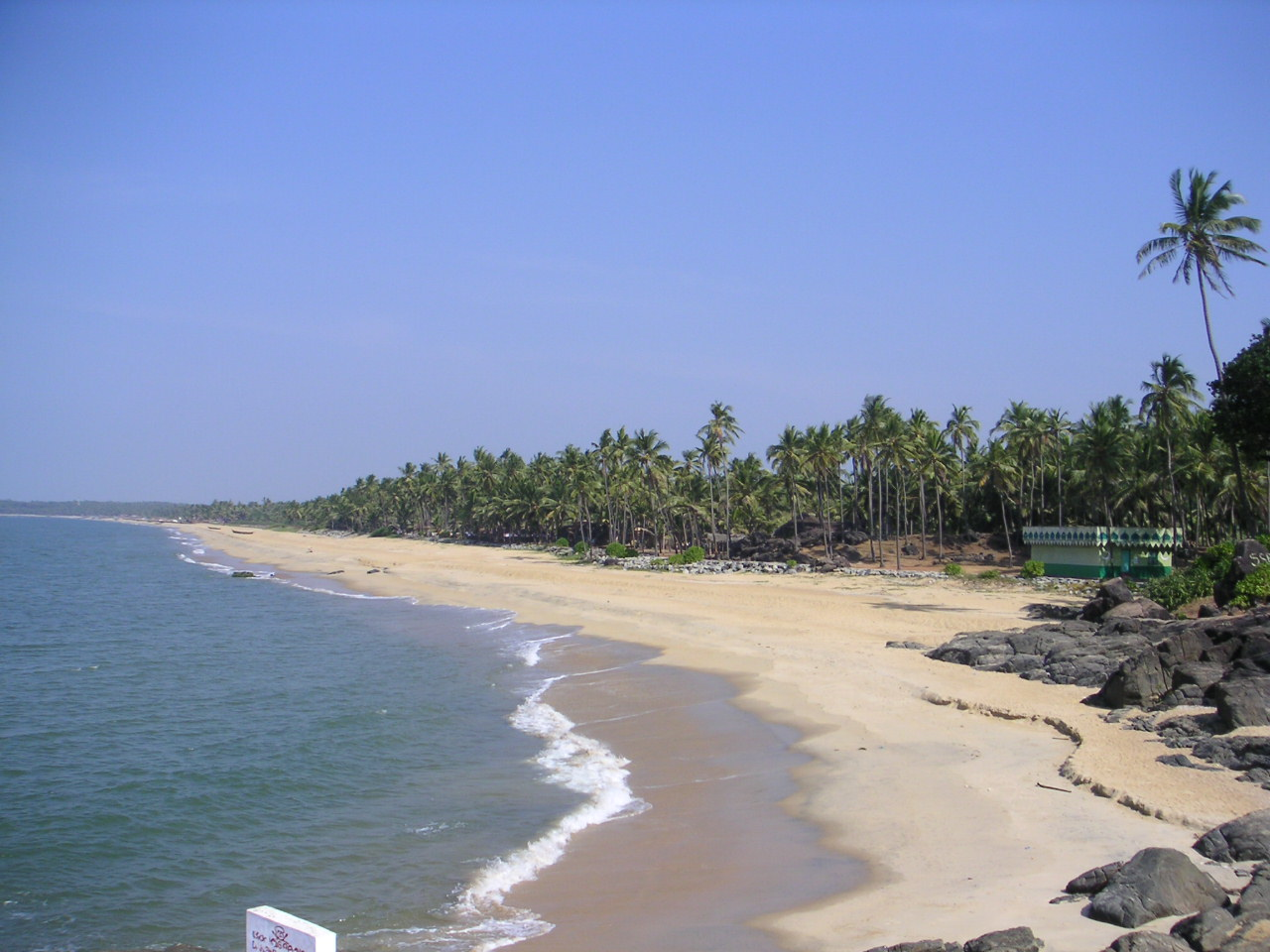 Bekal, Kerala. Photo: Soman